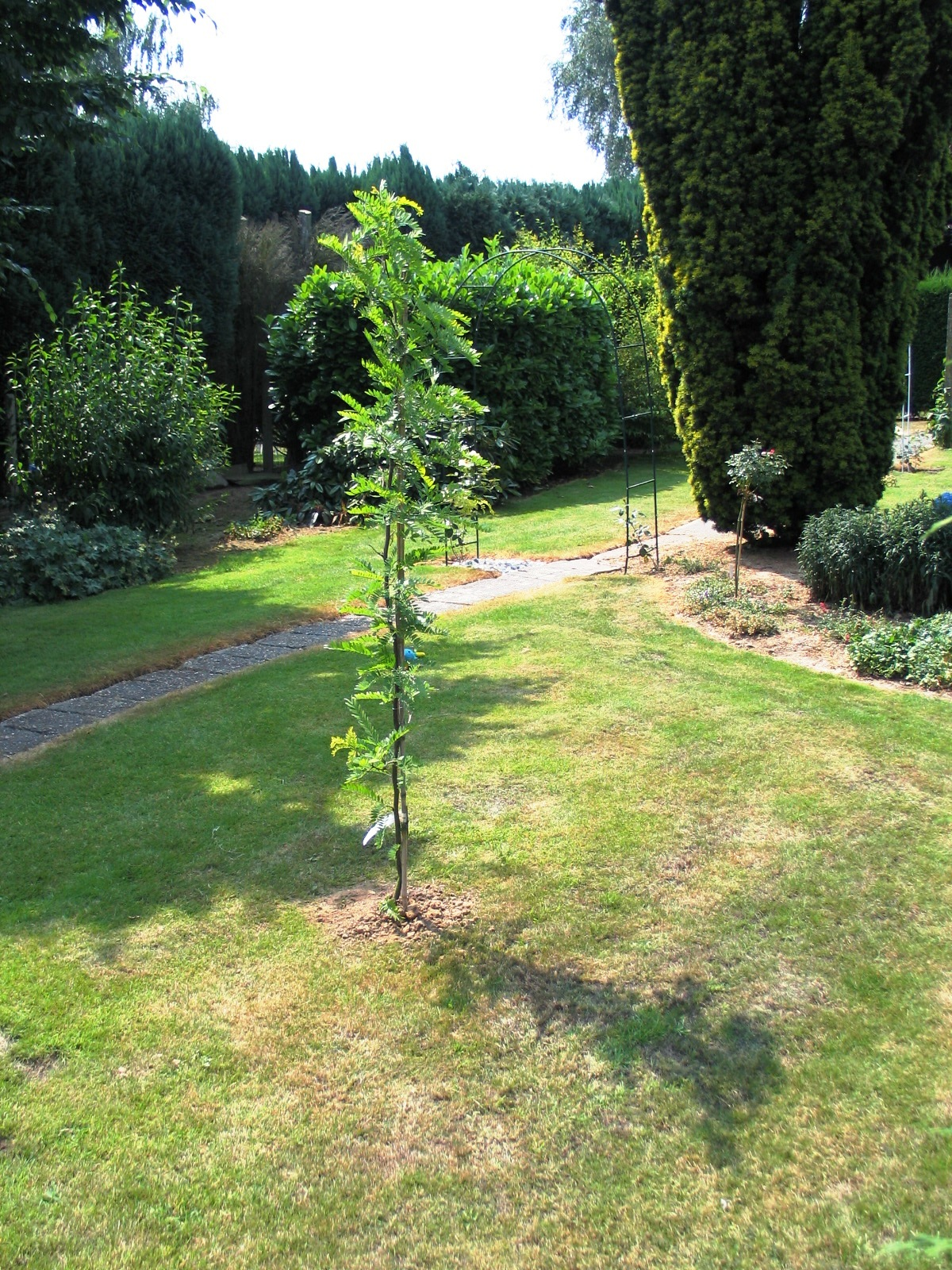 Valse christusdoorn